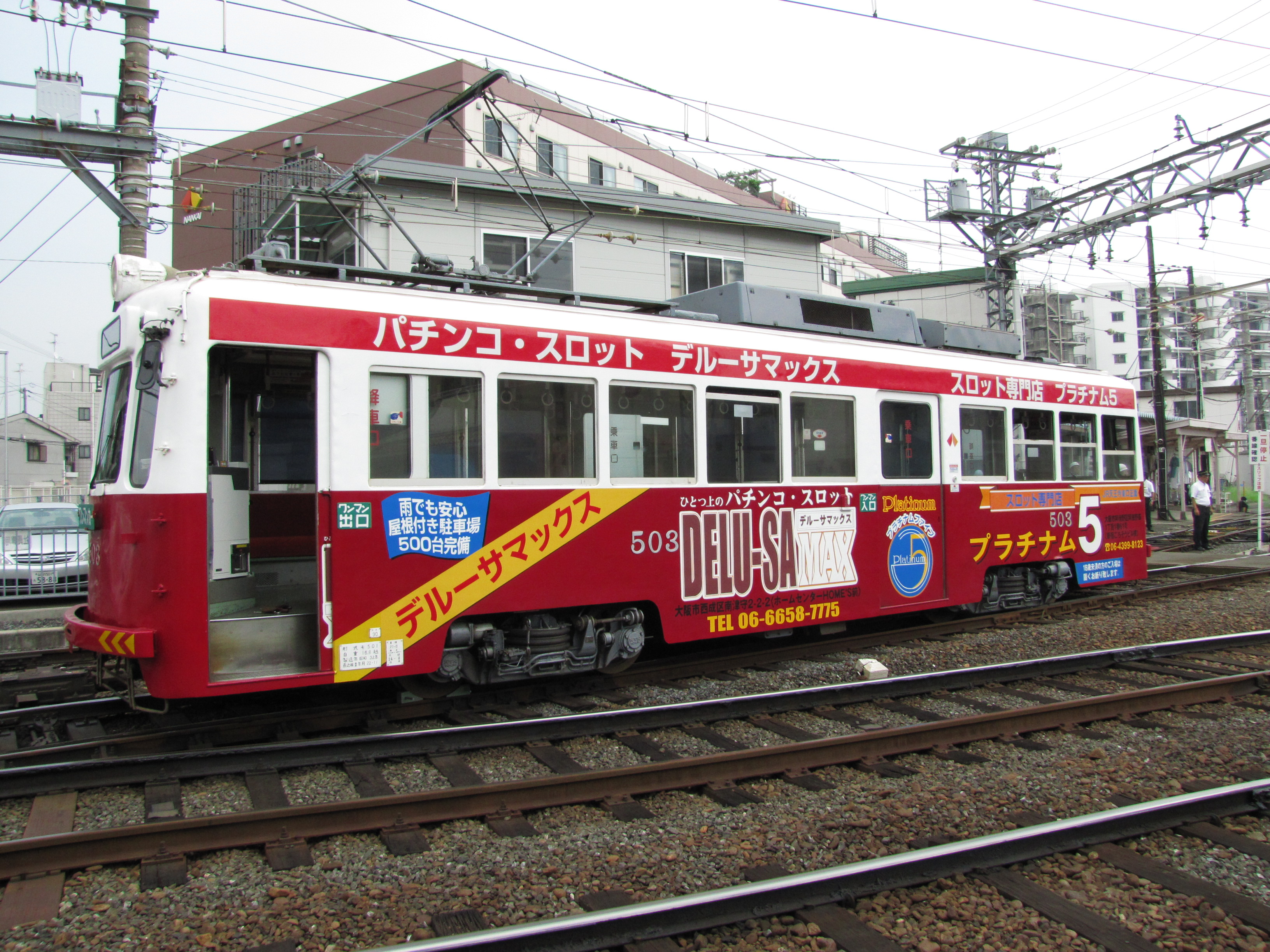 台車が線路から落ちているのを確認できる。